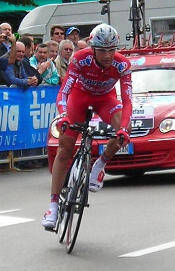 Stefano Garzelli en la 20ª etapa del Giro de Italia 2007 (Bardolino - Verona, 43 km CRI)